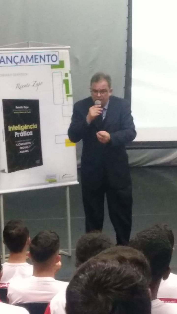 Lançamento do livro Inteligência Prática, do autor e magistrado Renato Zupo.